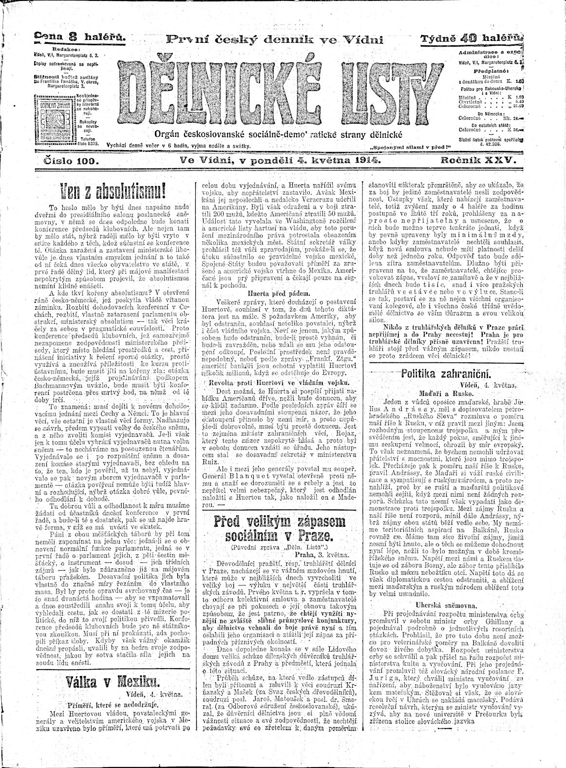 Sozialdemokratische Dělnické listy, Wien, Ausgabe von 4. Mai 1914